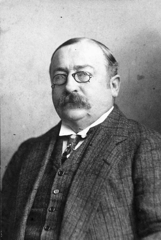 Robert Leibnitz Scherl: Robert Leibnitz, 1910 Fotograf: Franz Kullrich [Porträt] Abgebildete Personen: Leibnitz, Robert: Regierungsbaumeister, Deutschland